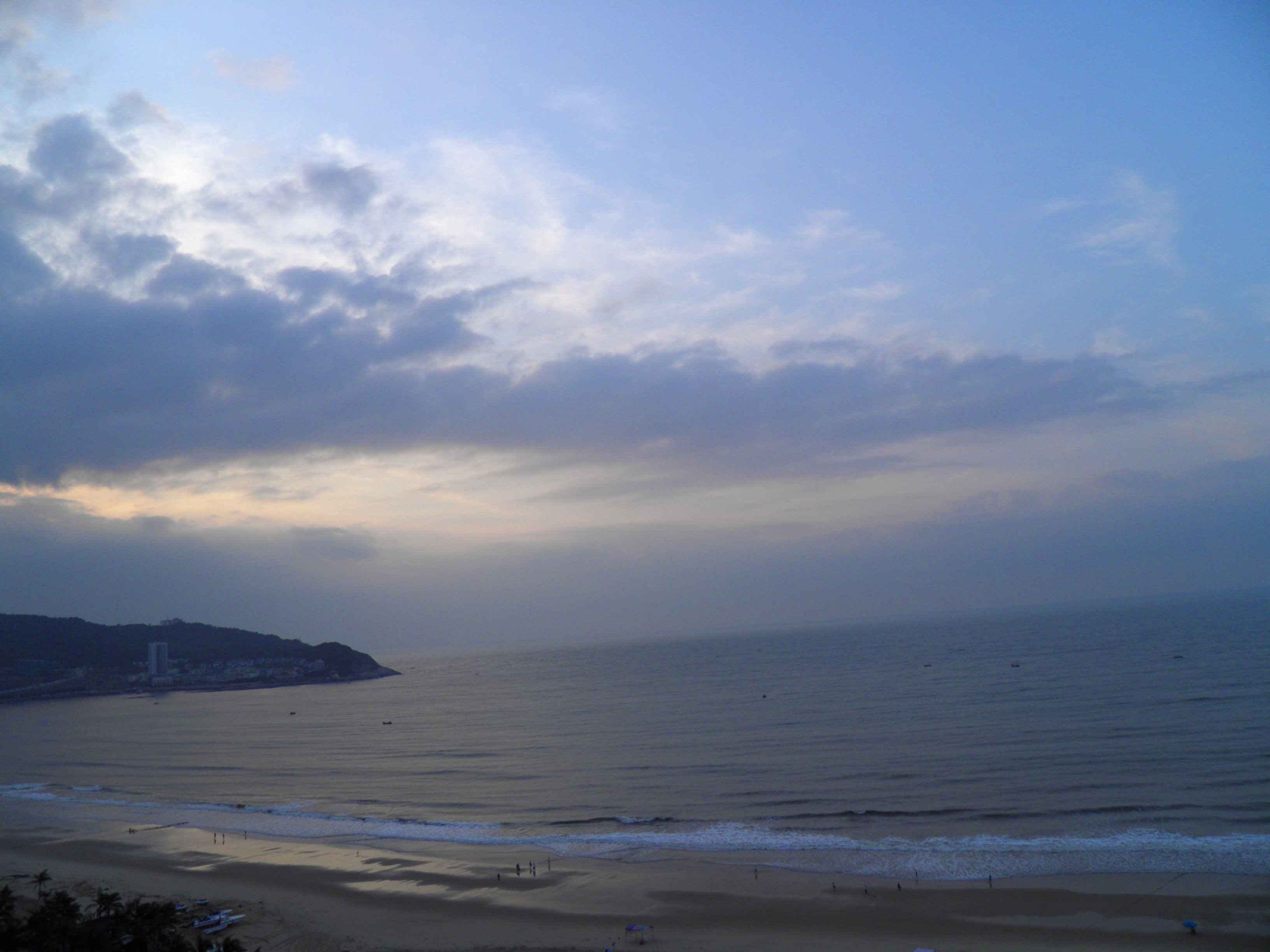 yangjiang